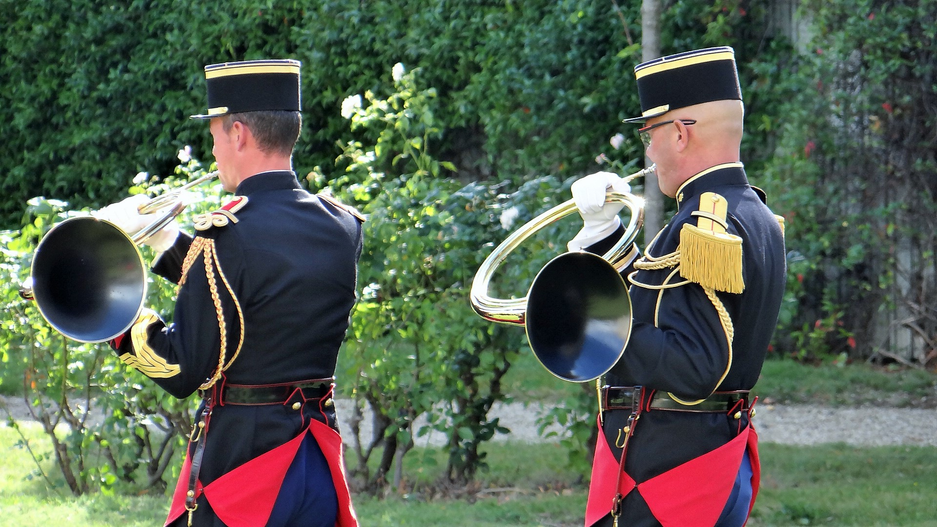 Trompes de chasse de la Républicaine en concert dans les jardins à l'occasion des Journées Européennes de Patrimoine 2017.